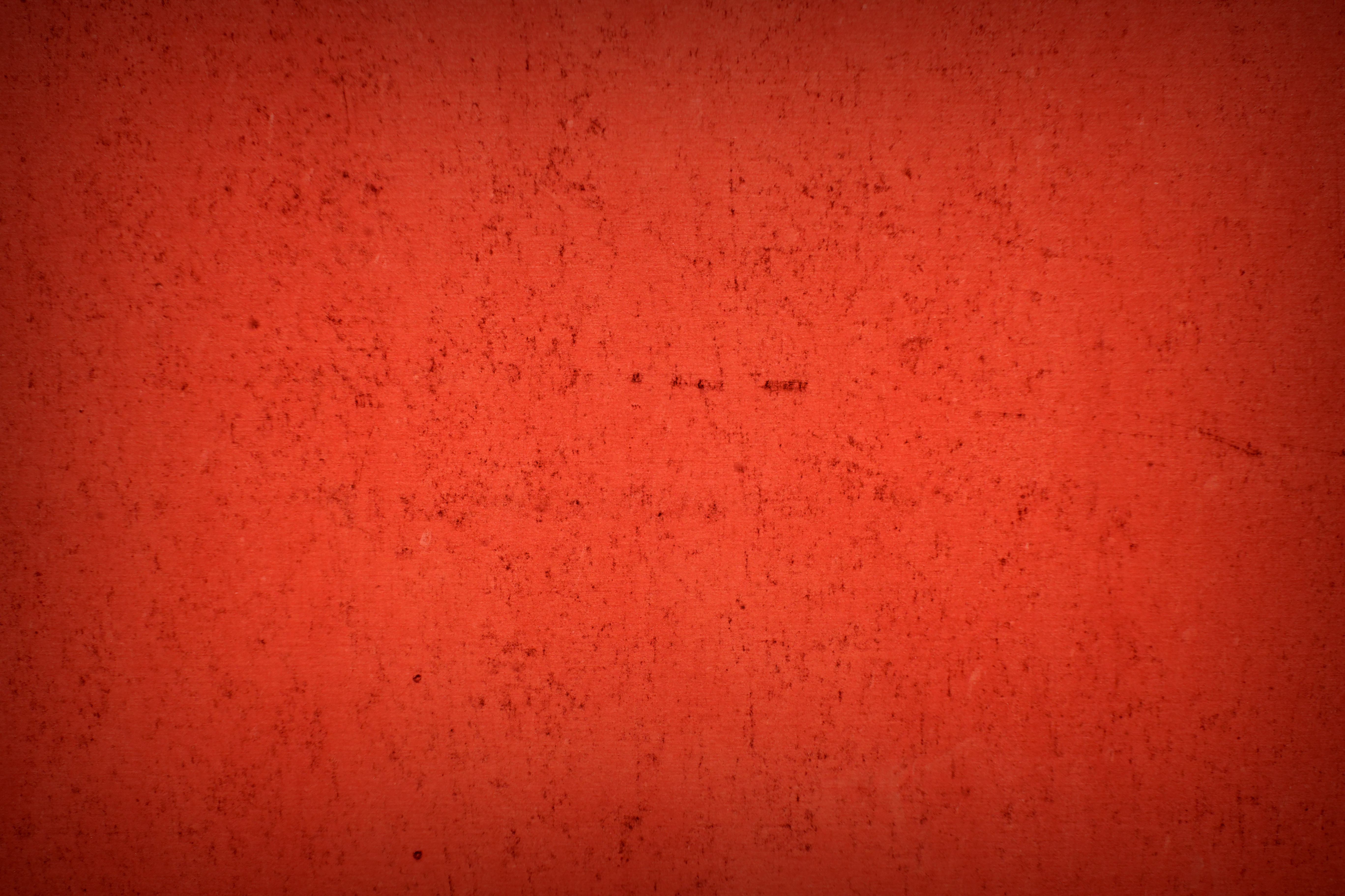 Red